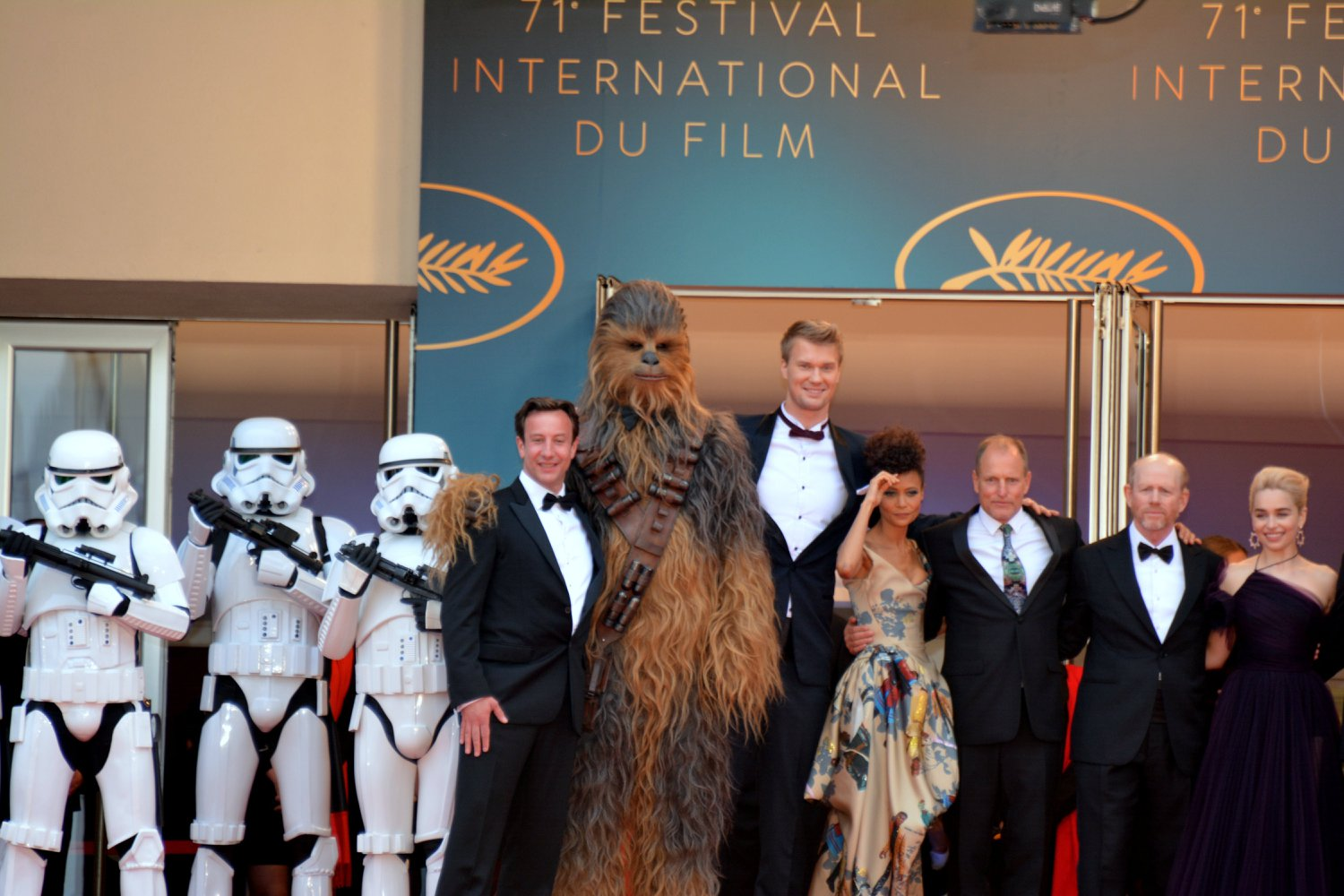 Présentation de "Solo : a Star Wars story" au festival de Cannes. Des figurants habillés en stormtroopers et en Chewbacca, le producteur Simon Emanuel, Joonas Suotamo (interprète de Chewbacca dans le film, Thandie Newton, Woody Harrelson, Ron Howard, Emilia Clarke.